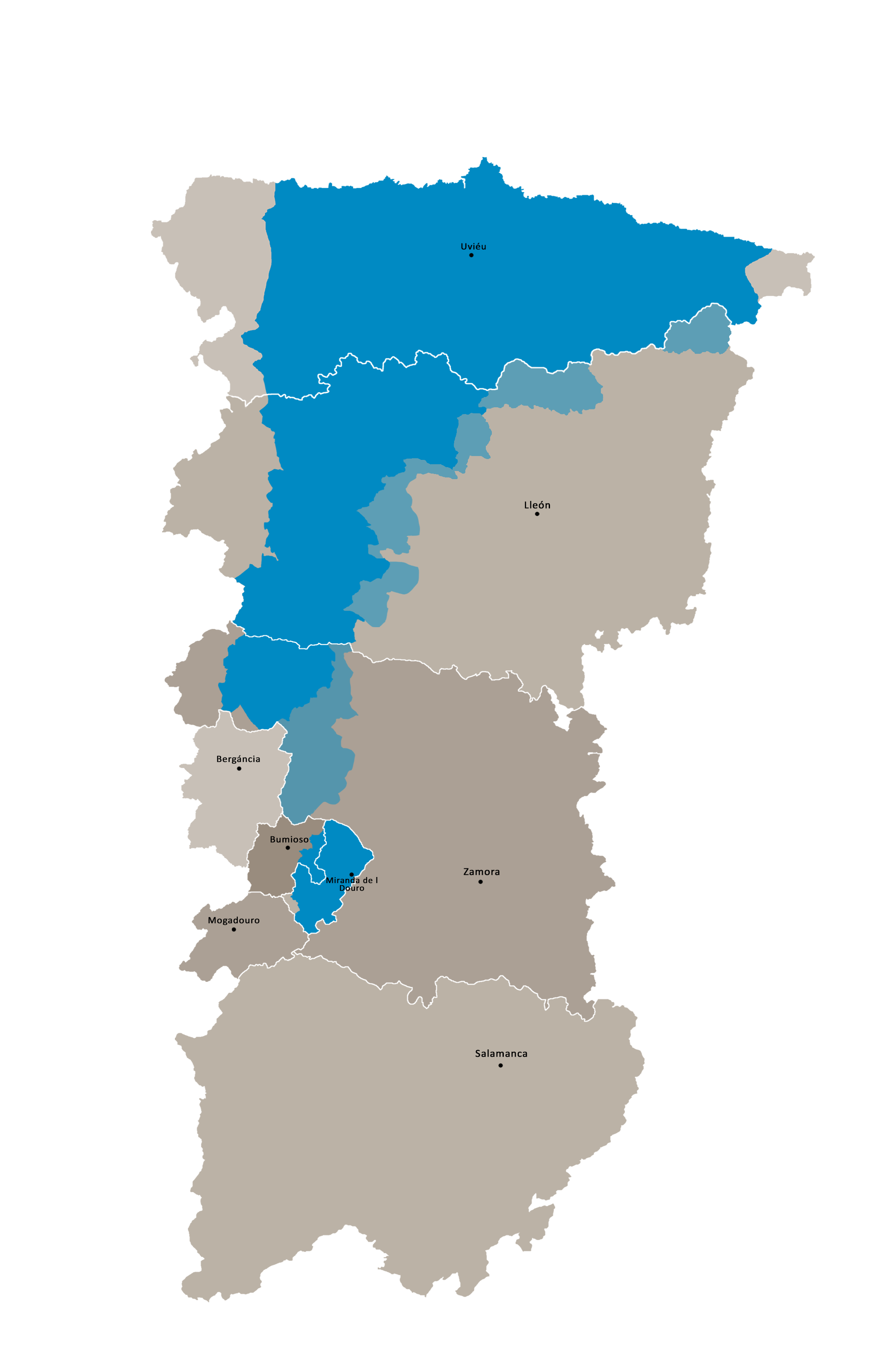 Mapa de la estensión xeográfica de la llingua asturiana.